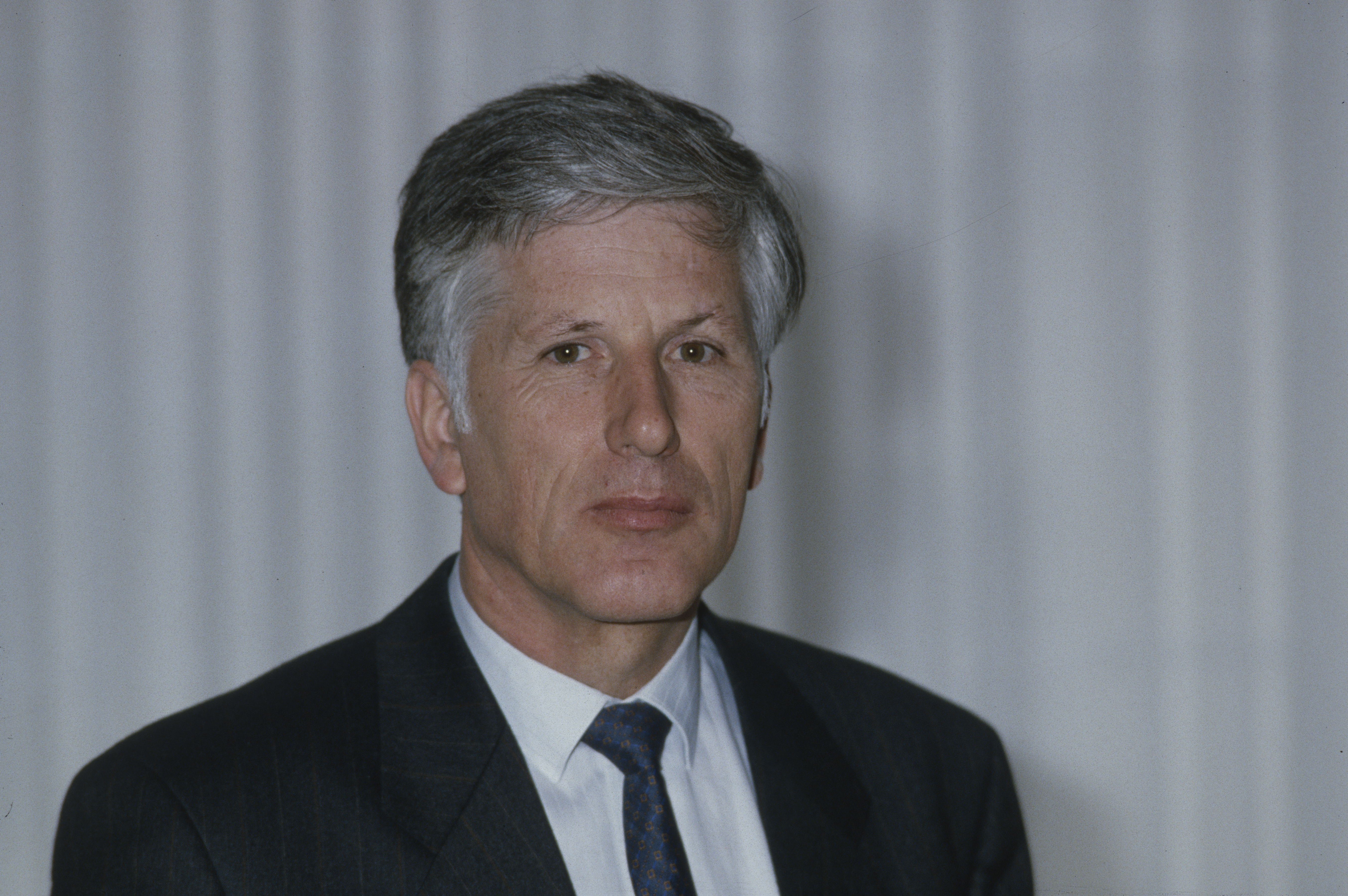 Eduard Belser (* 1942), Regierungsrat des Kantons Baselland 1987–1999 (SP)